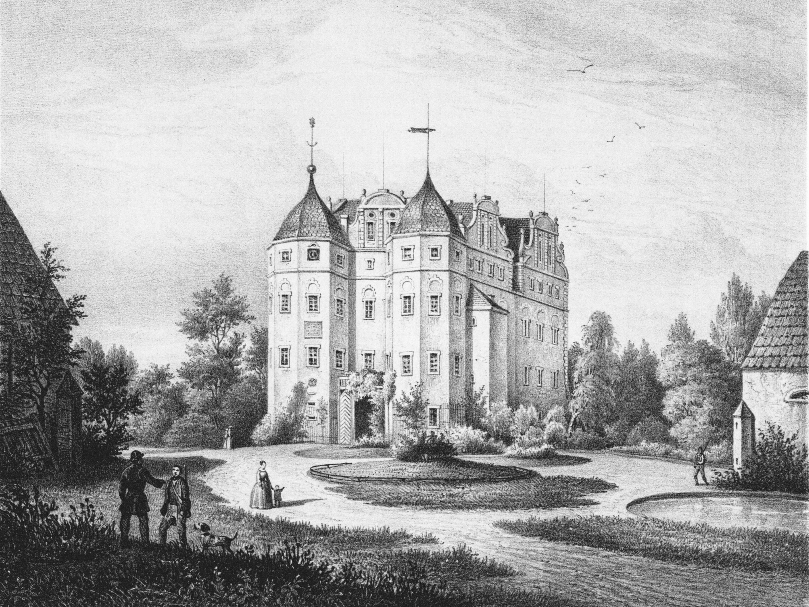 Das Rittergut Alt-Hörnitz Mitte des 19. Jahrhunderts